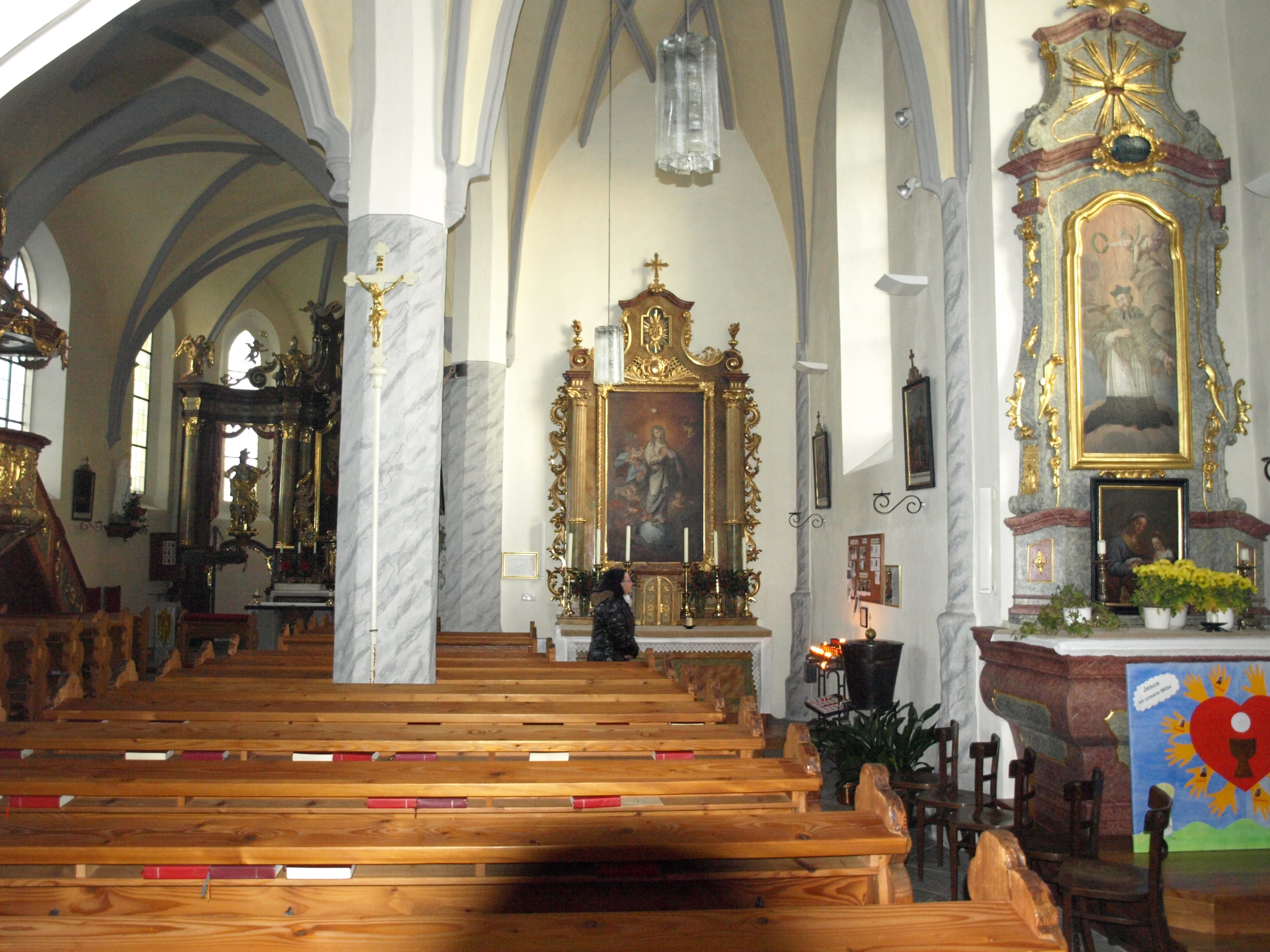 Kath. Pfarrkirche hl. Leonhard und Friedhof